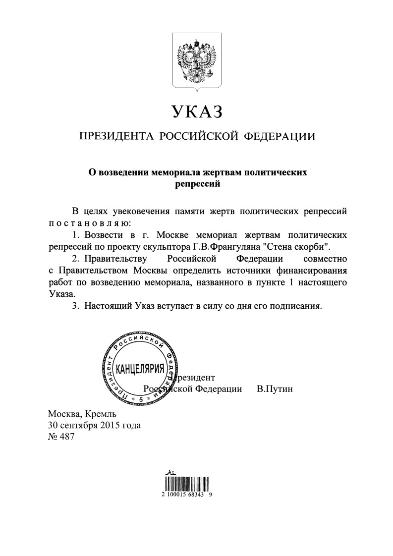 Указ Президента Российской Федерации от 30.09.2015 г. № 487 «О возведении мемориала жертвам политических репрессий»